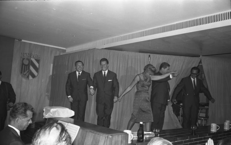 "Münchner Abend" Landesvertretung Bayern Bonn